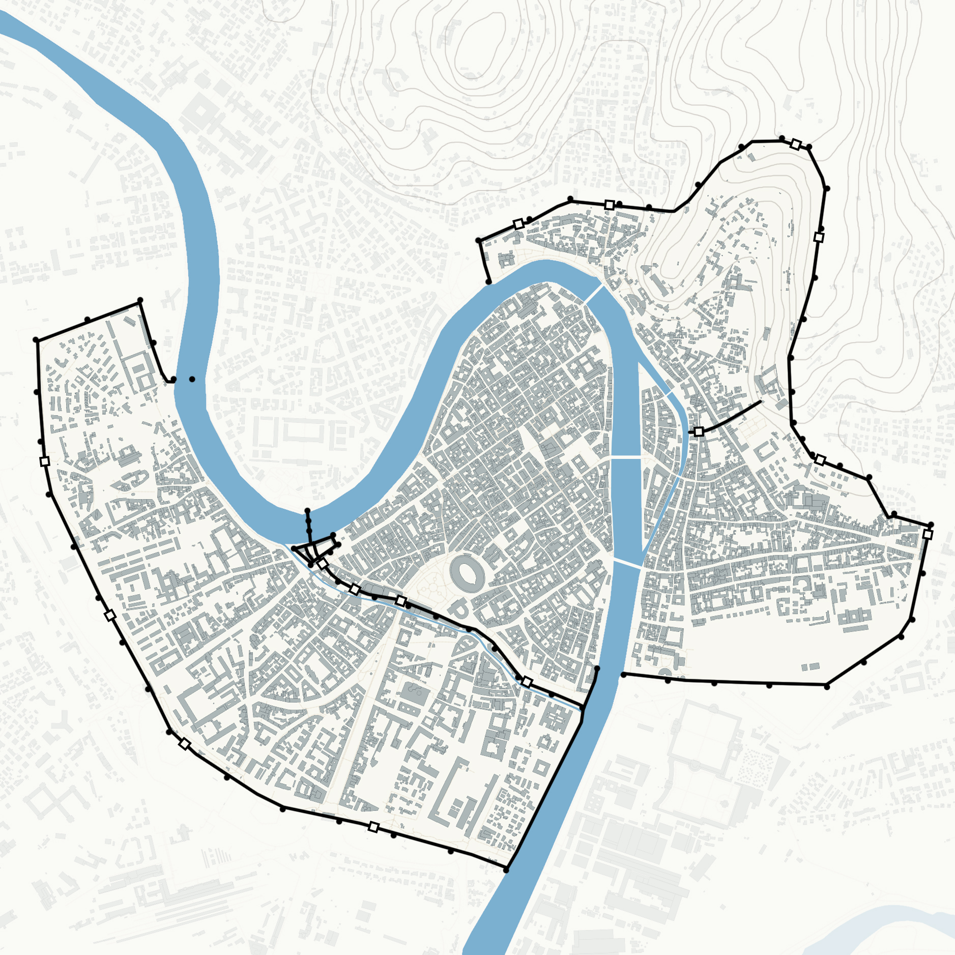 Planimetria della città di Verona con le mura e le porte urbiche principali. Vedi anche Le mura di Verona di Annamaria Conforti Calcagni.